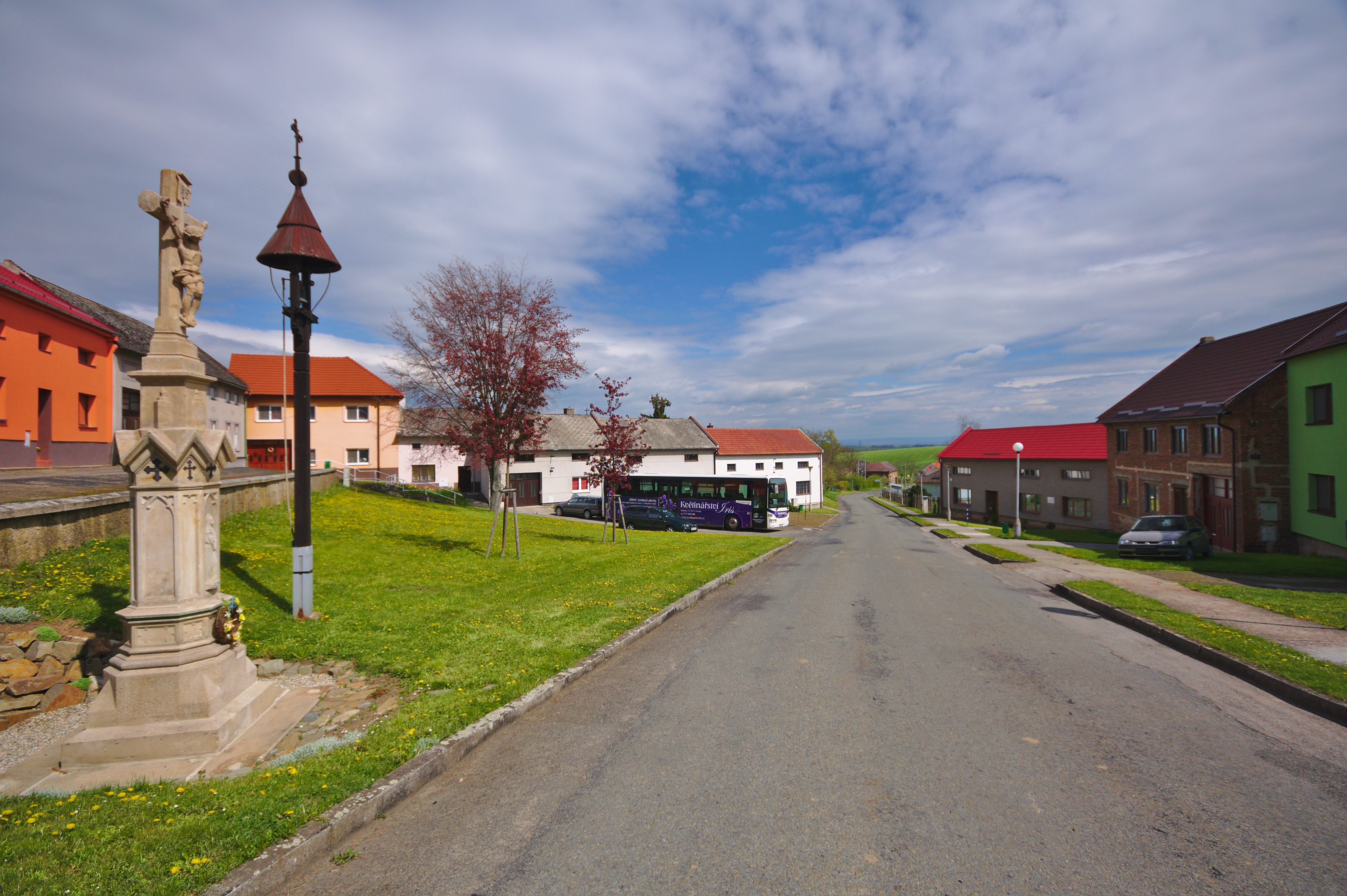 Kříž a zvonička na návsi, Srbce, okres Prostějov